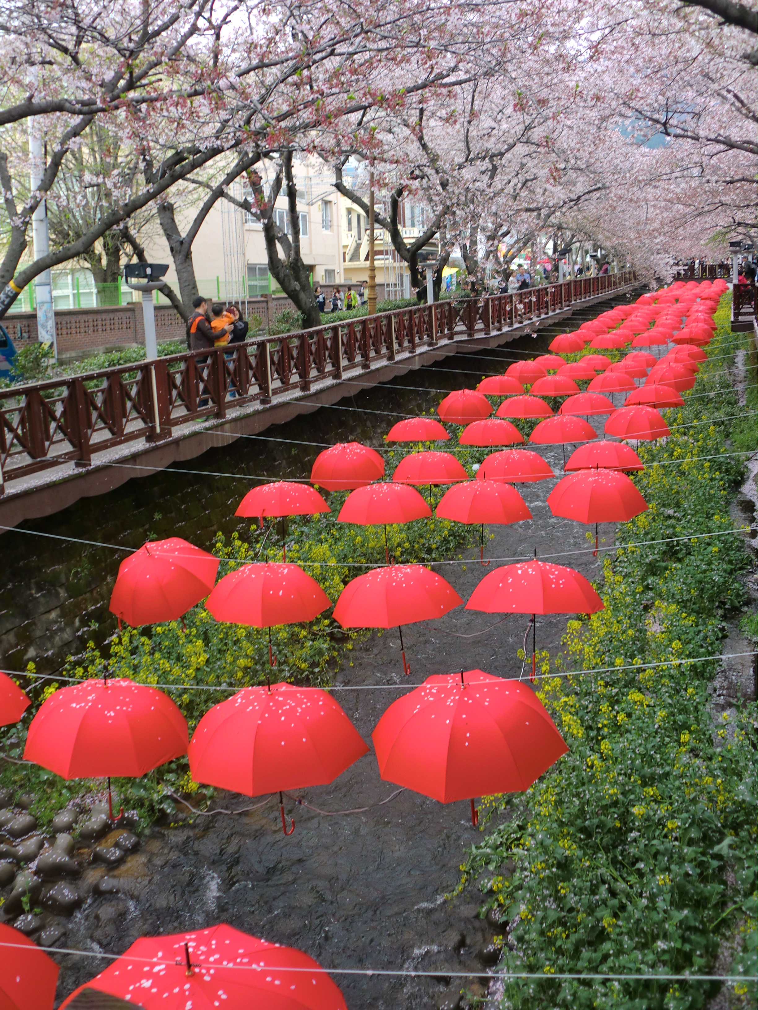 2016 진해군항제